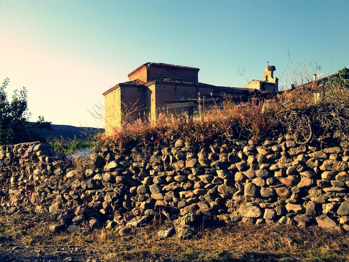 Convento de Fresno de rio tiron